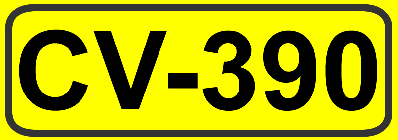 Inidcador de la Carretera de la Comunidad Valenciana CV-390